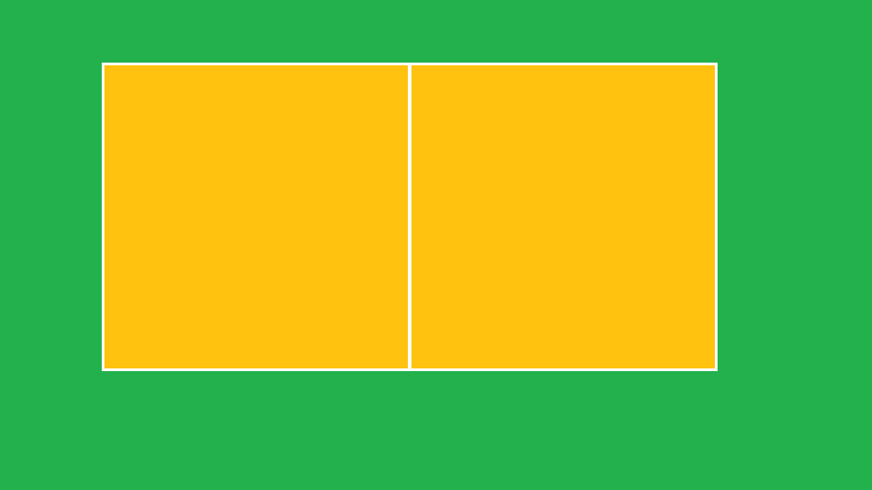 コート（原図）